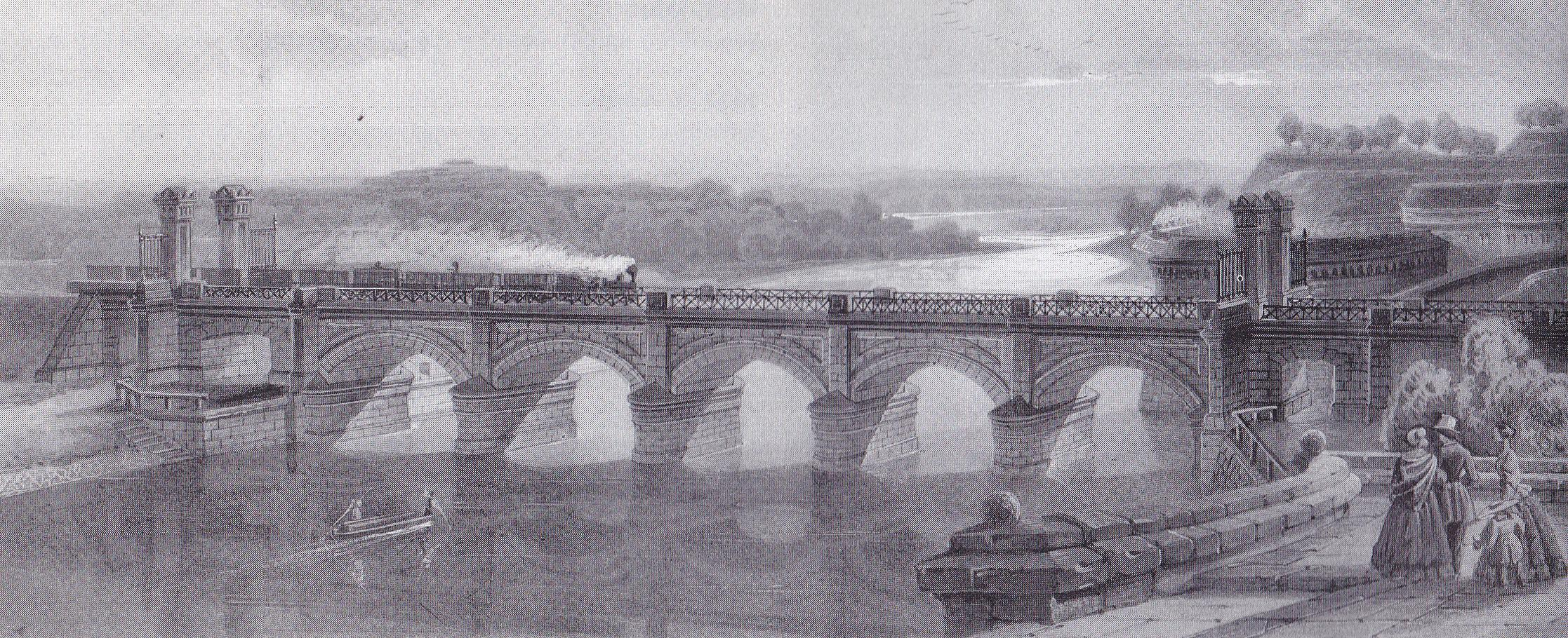 Eisenbahnbrücke über die Donau zwischen Ulm und Neu-Ulm mit darüberfahrendem Dampfzug um das Jahr 1855